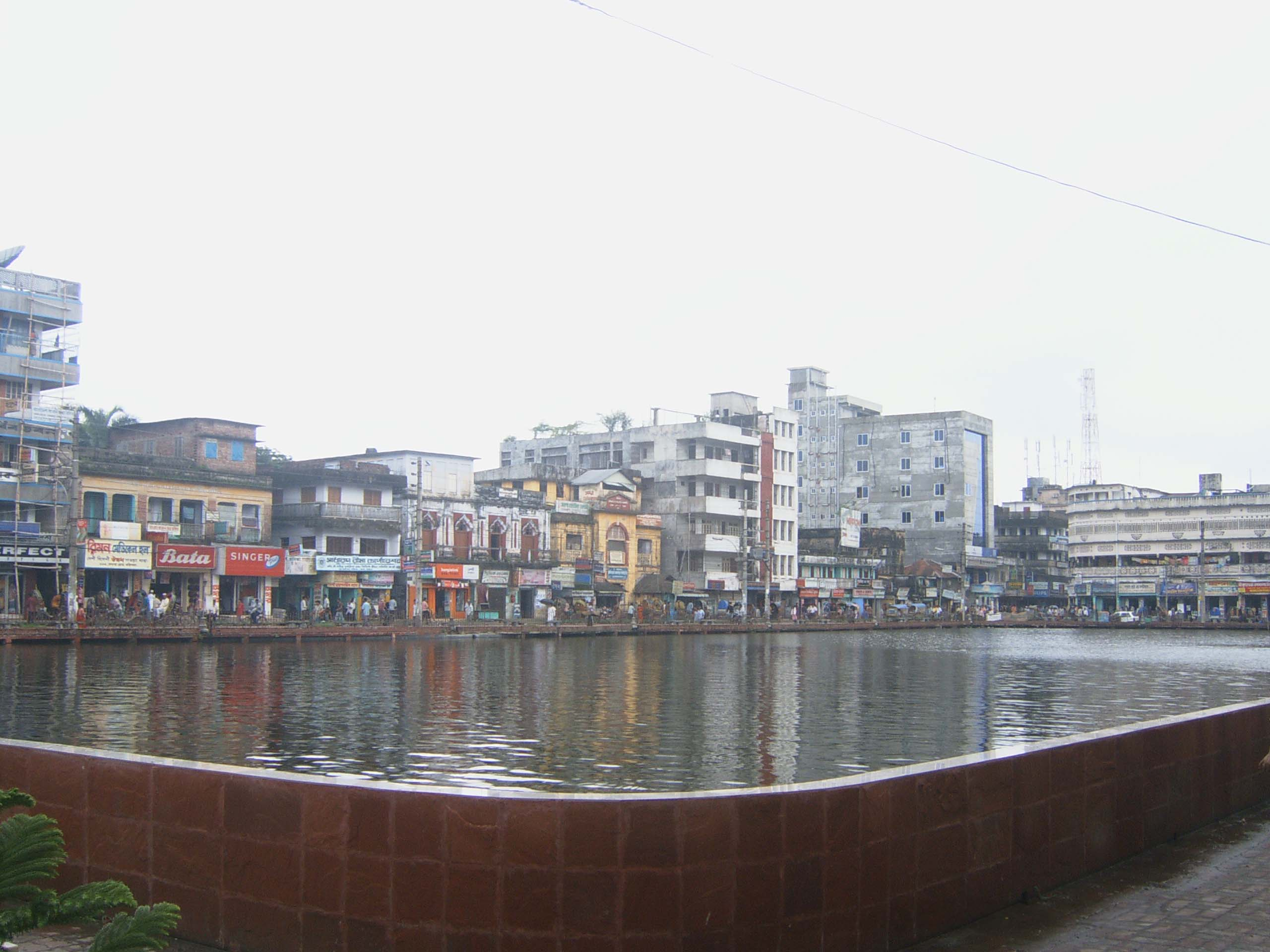 Bibir Pukur, Barisal, Bangladesh